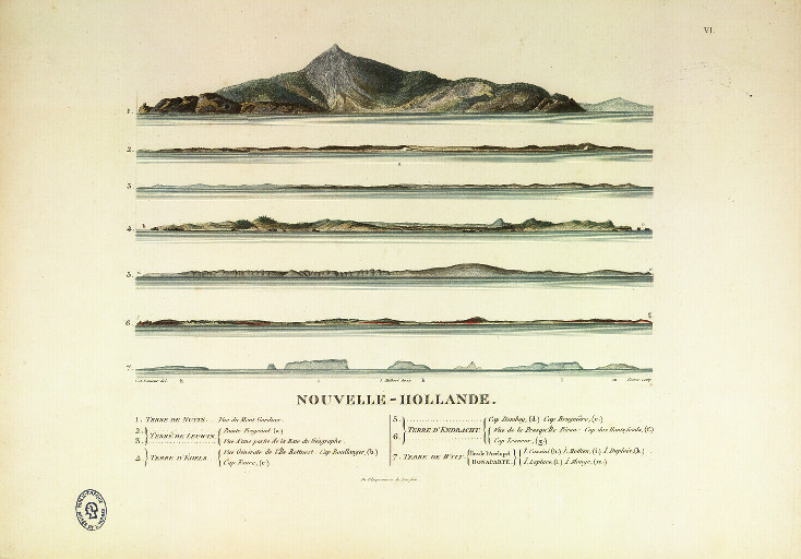 Planche montrant le profil des côtes de la Nouvelle-Hollande dans l'atlas du Voyage de découvertes aux terres australes